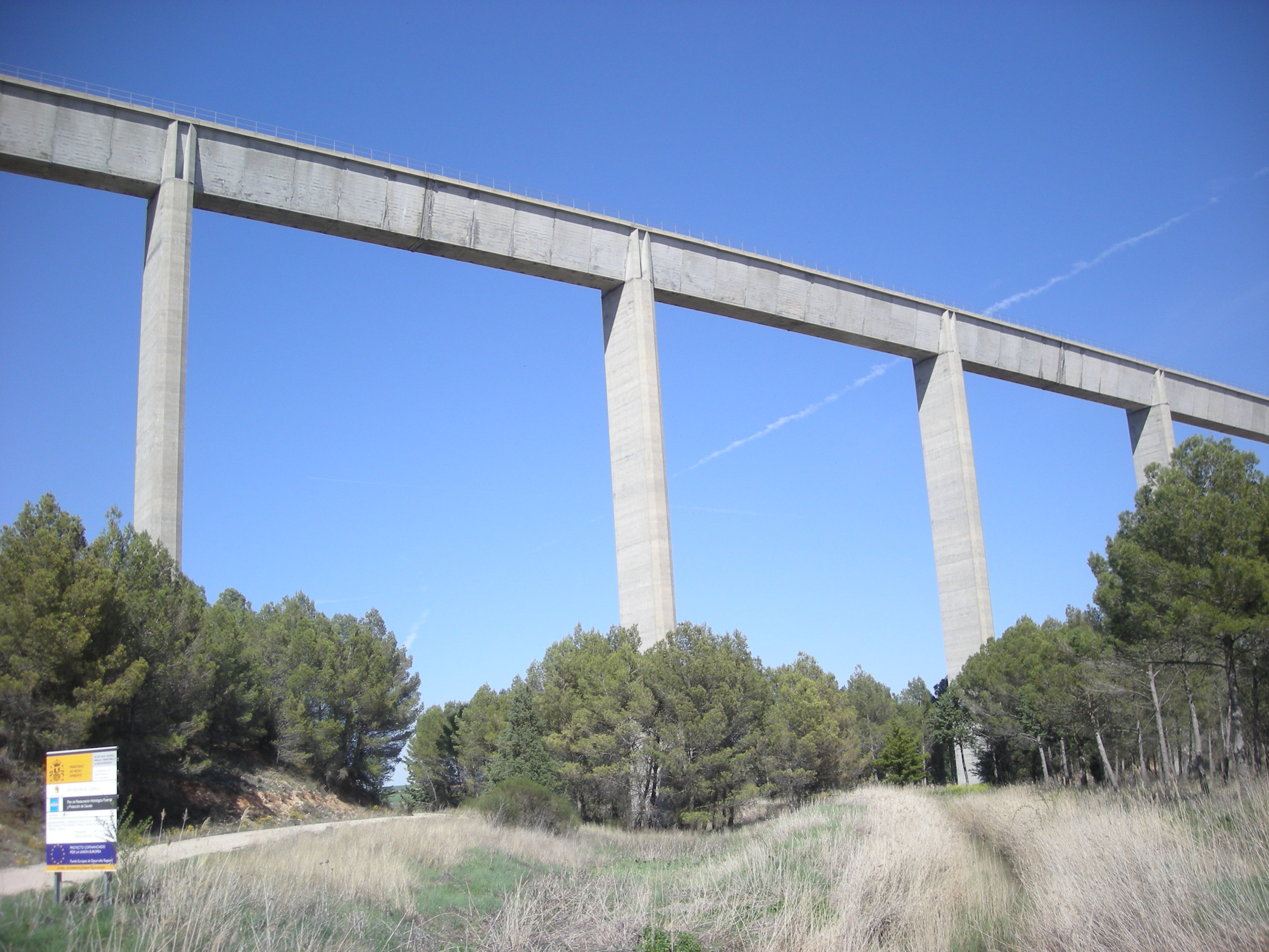 Trasvase Tajo-Segura, Alcázar del Rey, Cuenca, España